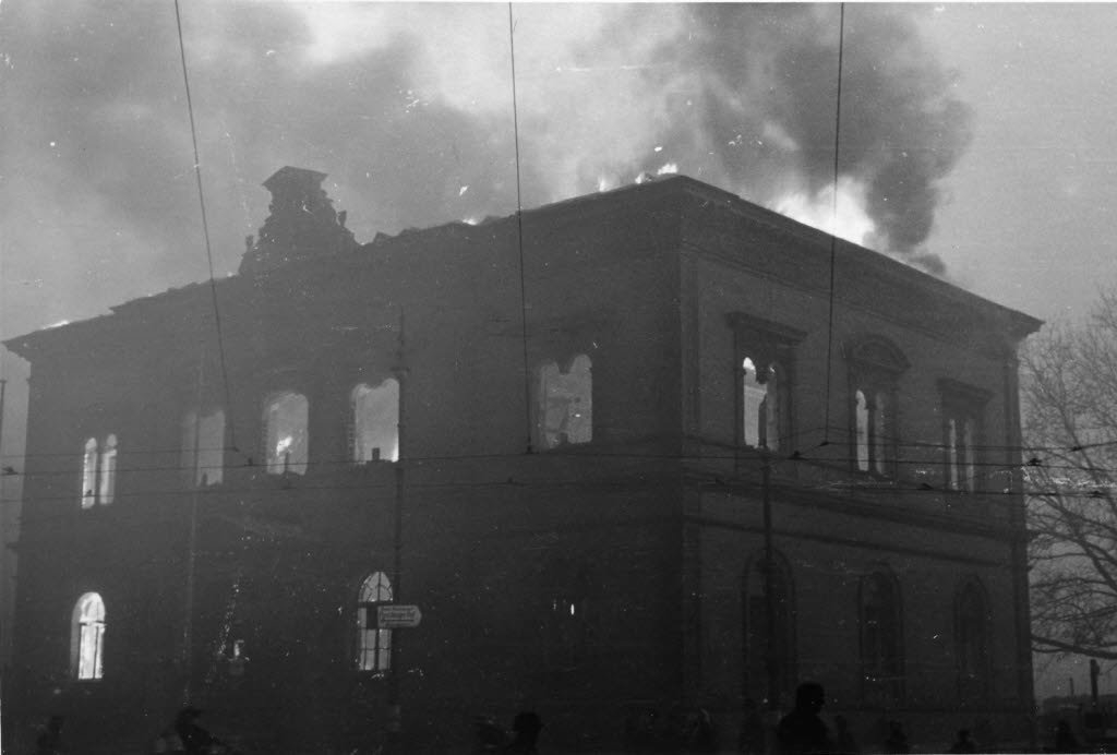 Brand im Thaulow-Museum am Sopienblatt 2 nach Volltreffer.